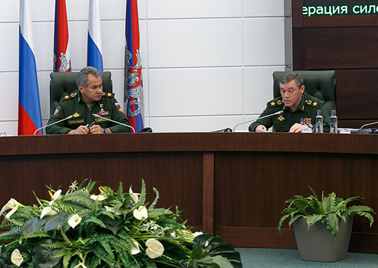 Совещании министра обороны РФ С. Шойгу с руководящим составом МО РФ в Национальном центре управления обороной РФ.